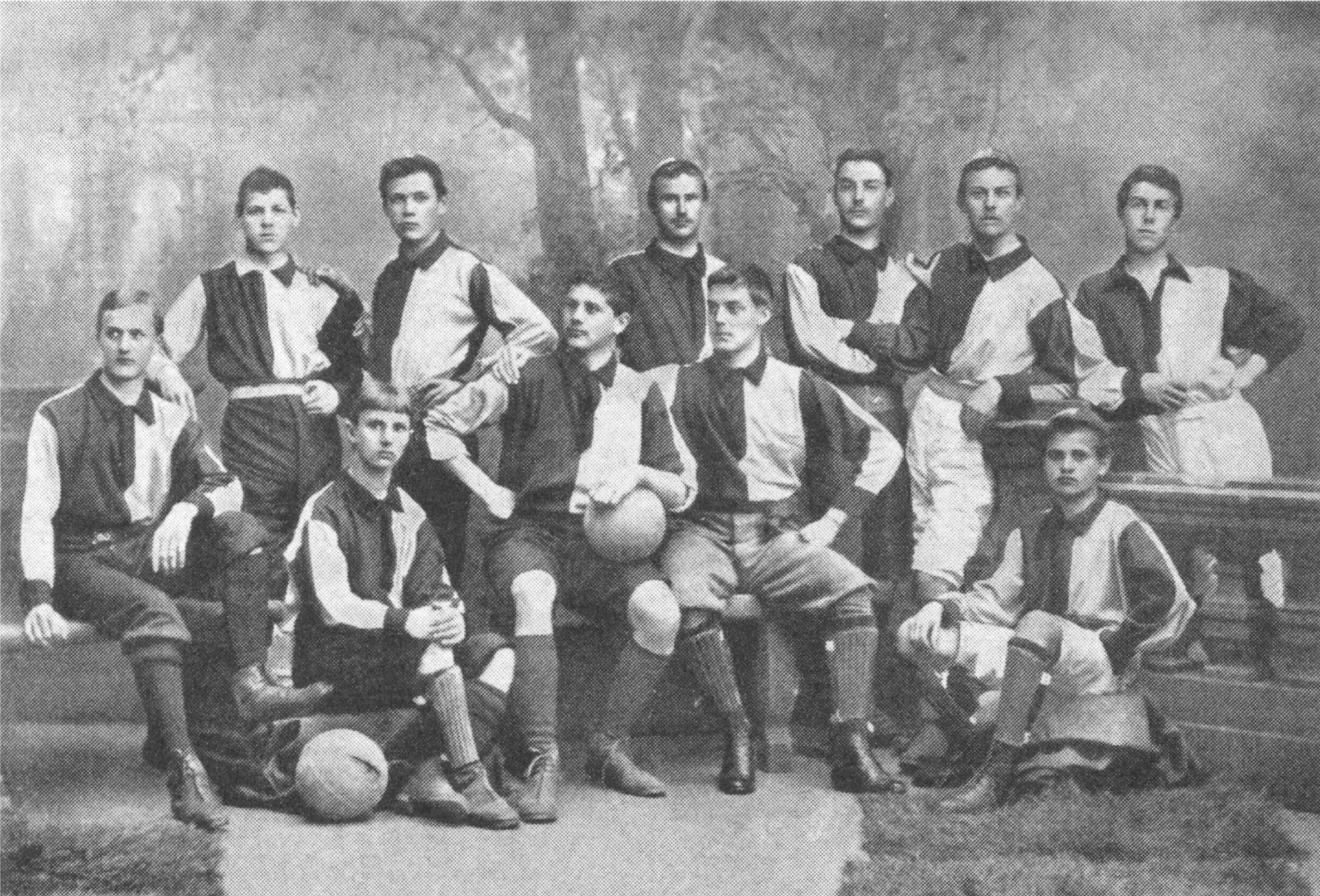 Karlsruher Kickers (gegründet 1893): Mannschaftsbild anläßlich der "Meisterschaft des Kontinents 1895" Stehend von links: König, Ernst Langer, Grenier, Roth, Strube, Moormann Sitzend von links: Ivo Schricker, Erwin Schricker, Walther Bensemann, Hall, Fritz Langer